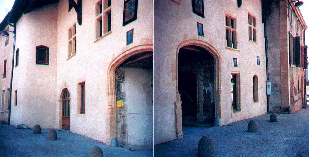 L'auberge de la Tête Noire